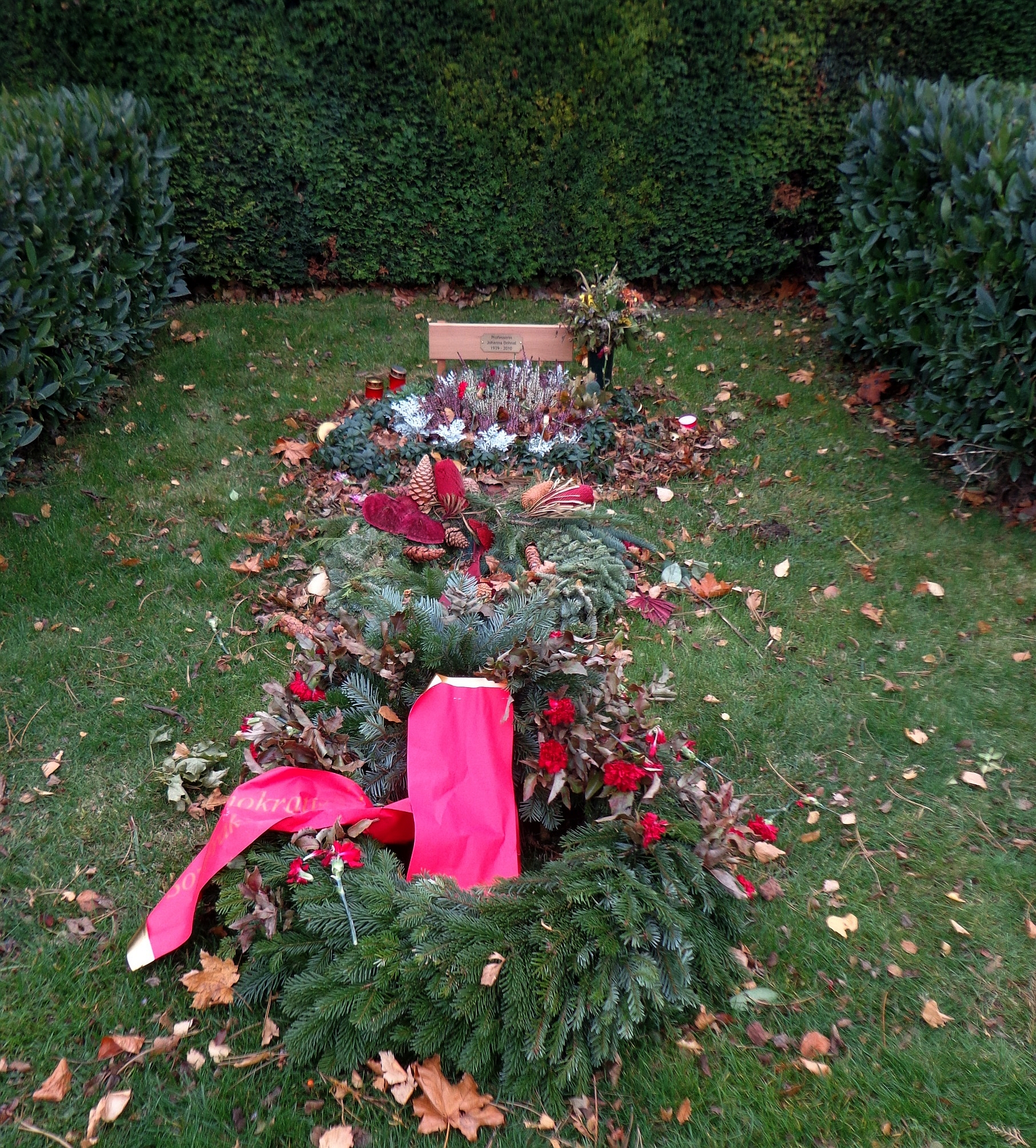 Wiener Zentralfriedhof - Gruppe 32 C, Ehrengrab von Johanna Dohnal